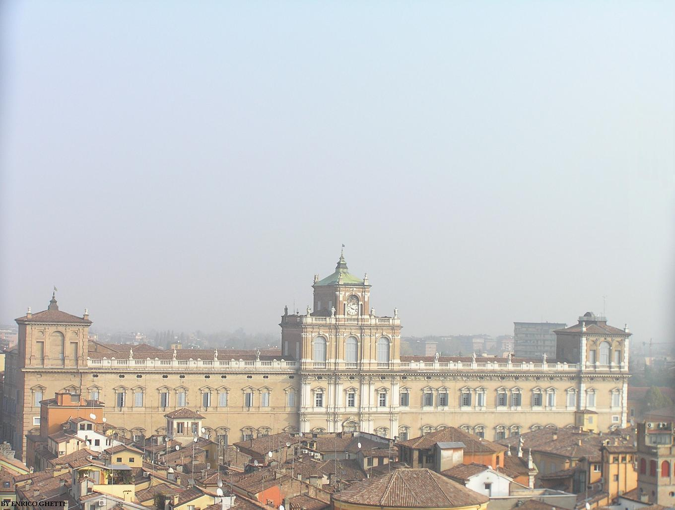 Foto scattata dall'ultimo piano visitabile della Ghirlandina (torre civica di Modena).